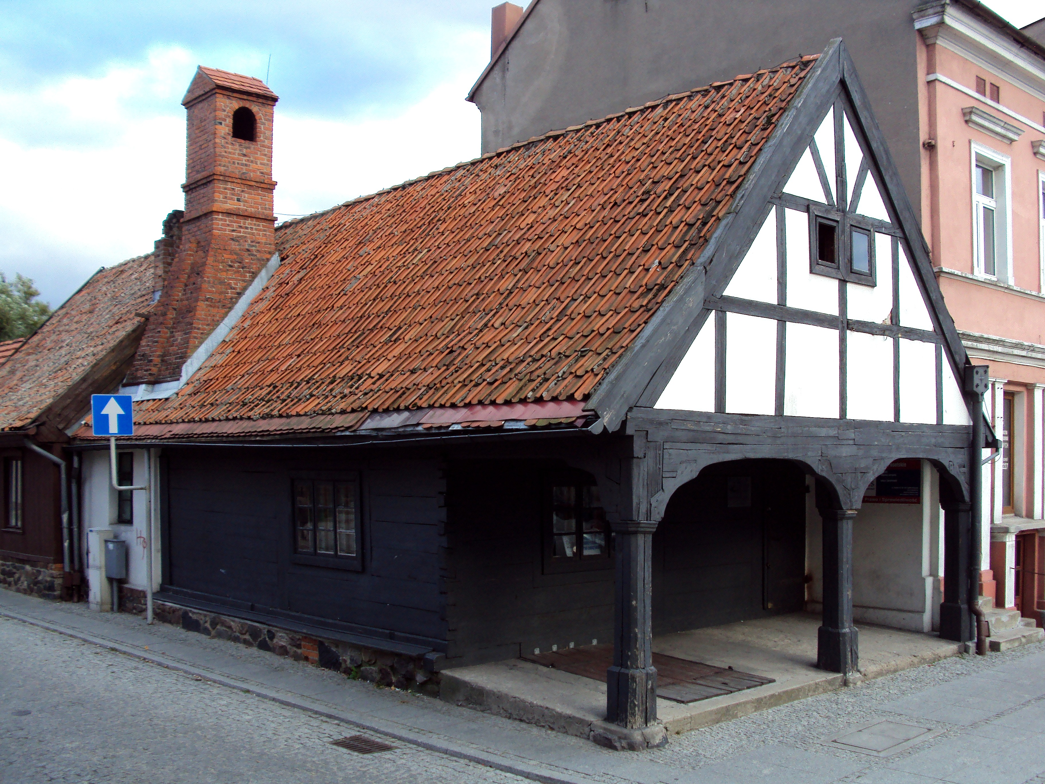 Golub-Dobrzyń, Rynek 19, Dom "Pod Kapturem", 1771